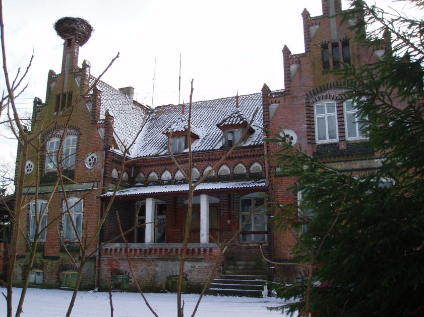 Dwór w Bądkach